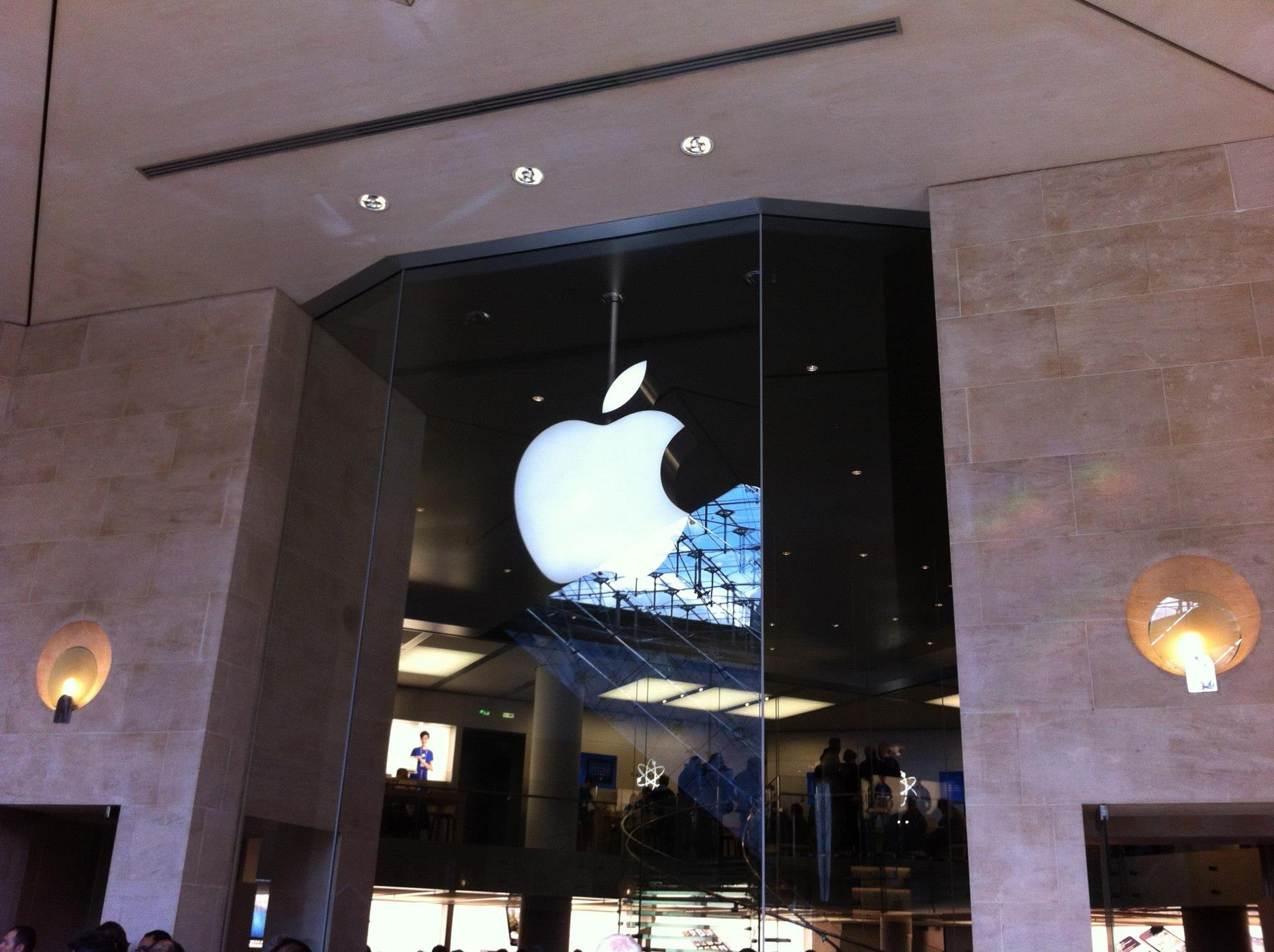 Apple Store v Louvru